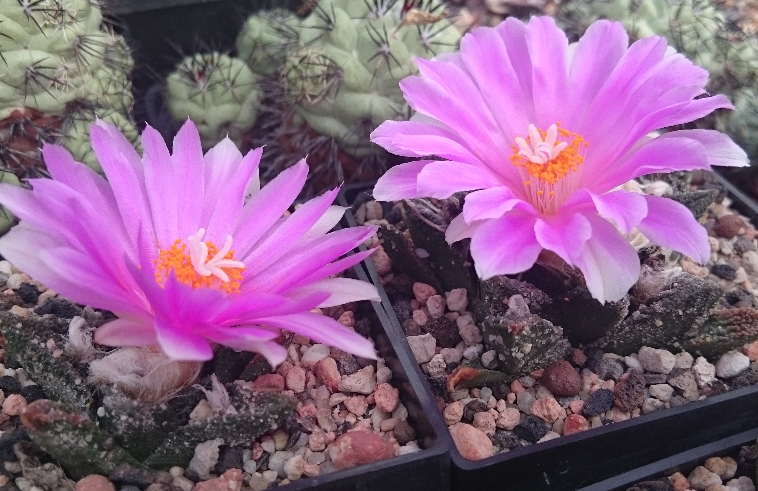 Ariocarpus bravoanus, Kulturpflanzen in Blüte